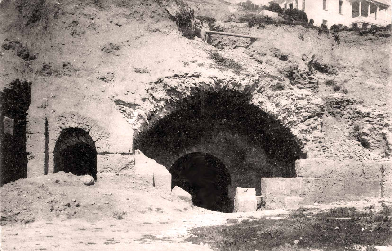 Carthage Entrée de la fontaine aux 1000 amphores